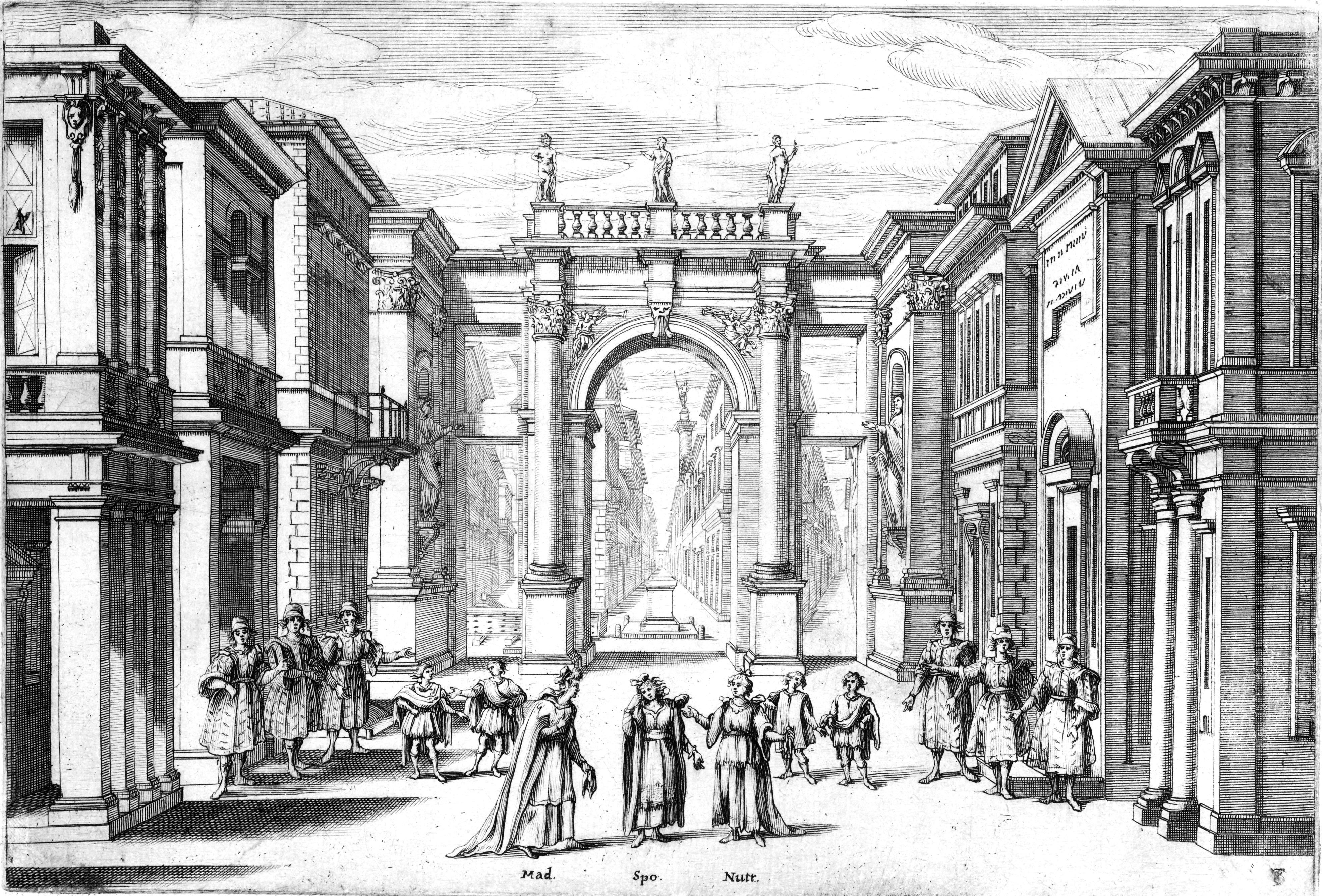 Stefano Landi - Il Sant'Alessio - Rome 1634 - Plate 3 without proscenium